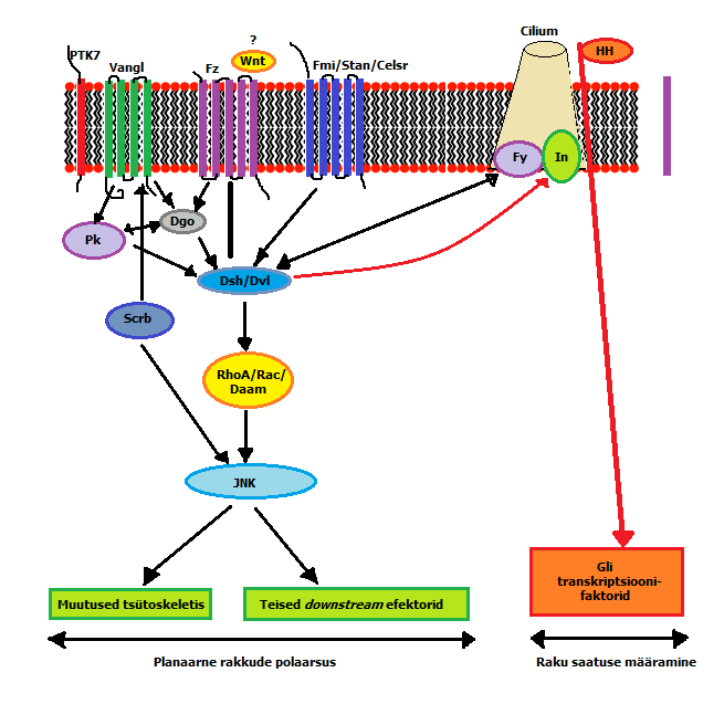 Planaarne raku polaarsuse Wnt signaalirada